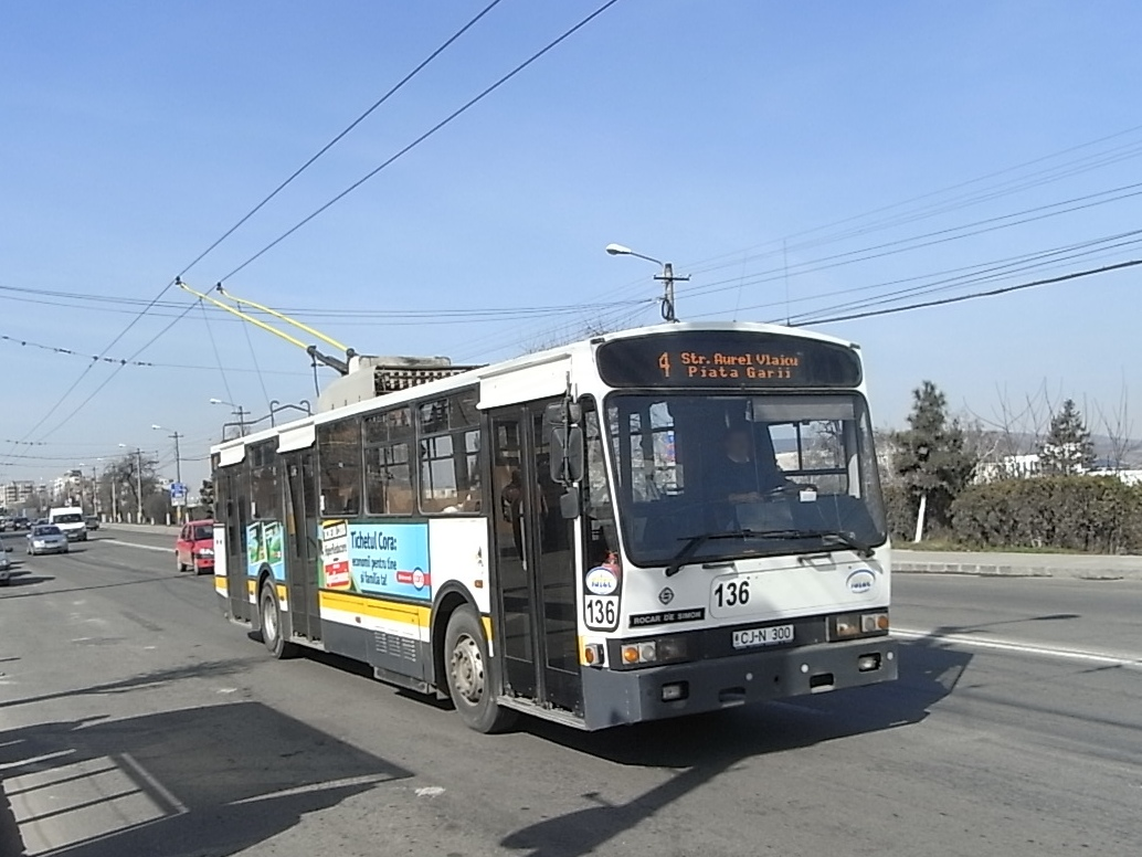 Ein Rocar-de-Simon-O-Bus der RATUC in Klausenburg